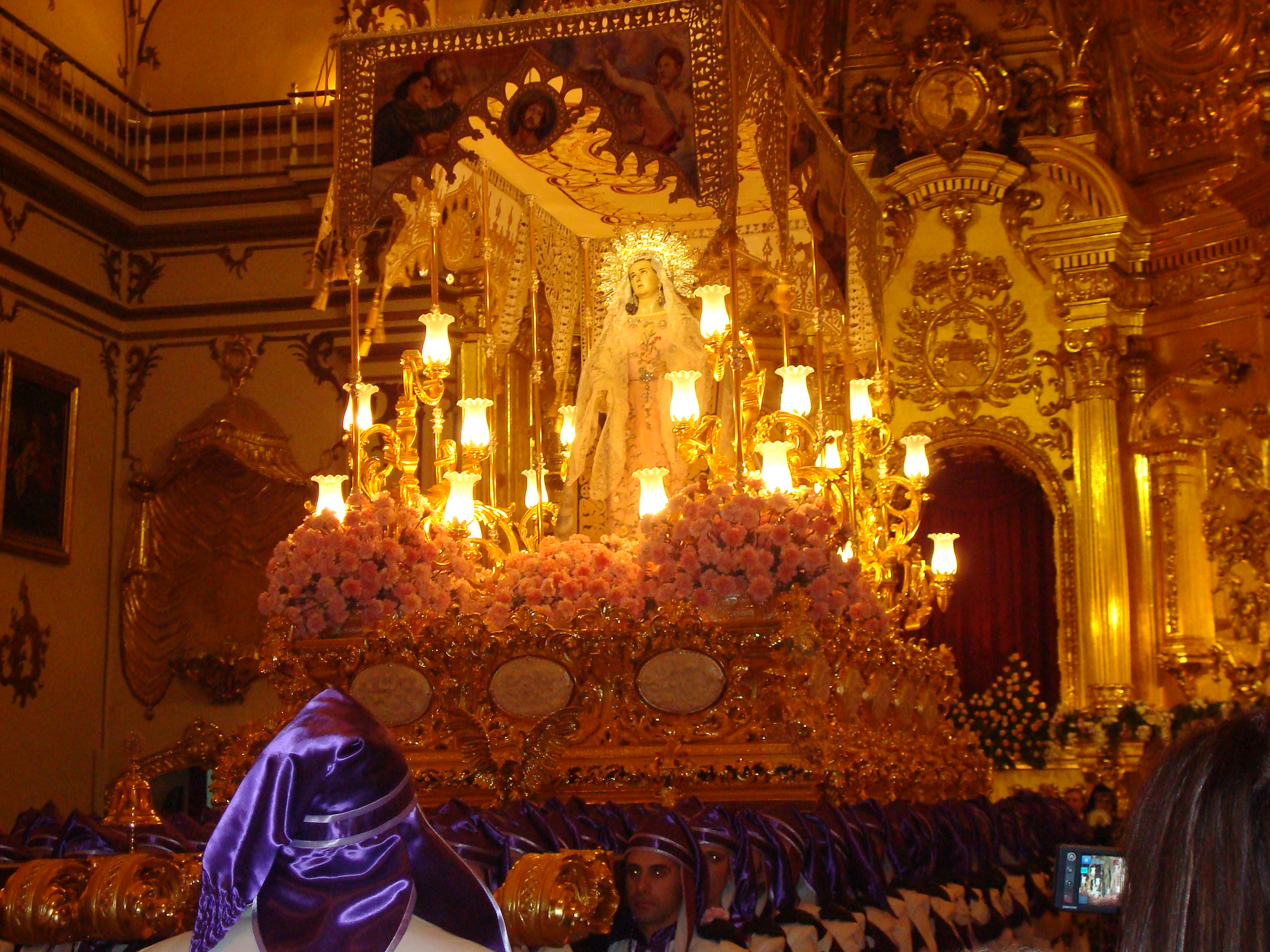 Virgen de la Amargura a su salida de Santo Domingo, Semana Santa Lorca